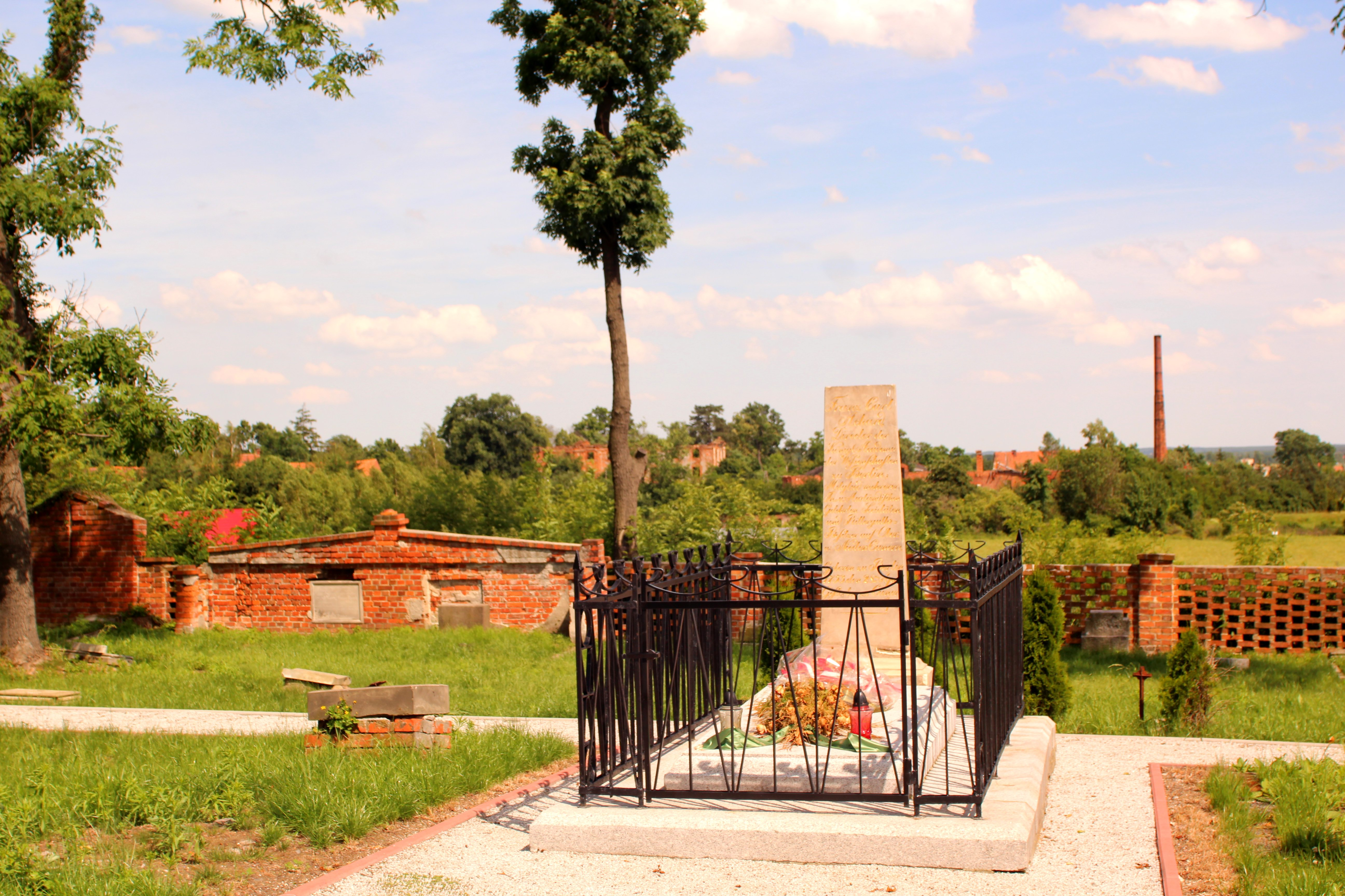 Grób Franza Karla Acharda na cmentarzu poniemieckim w Moczydlnicy Dworskiej.